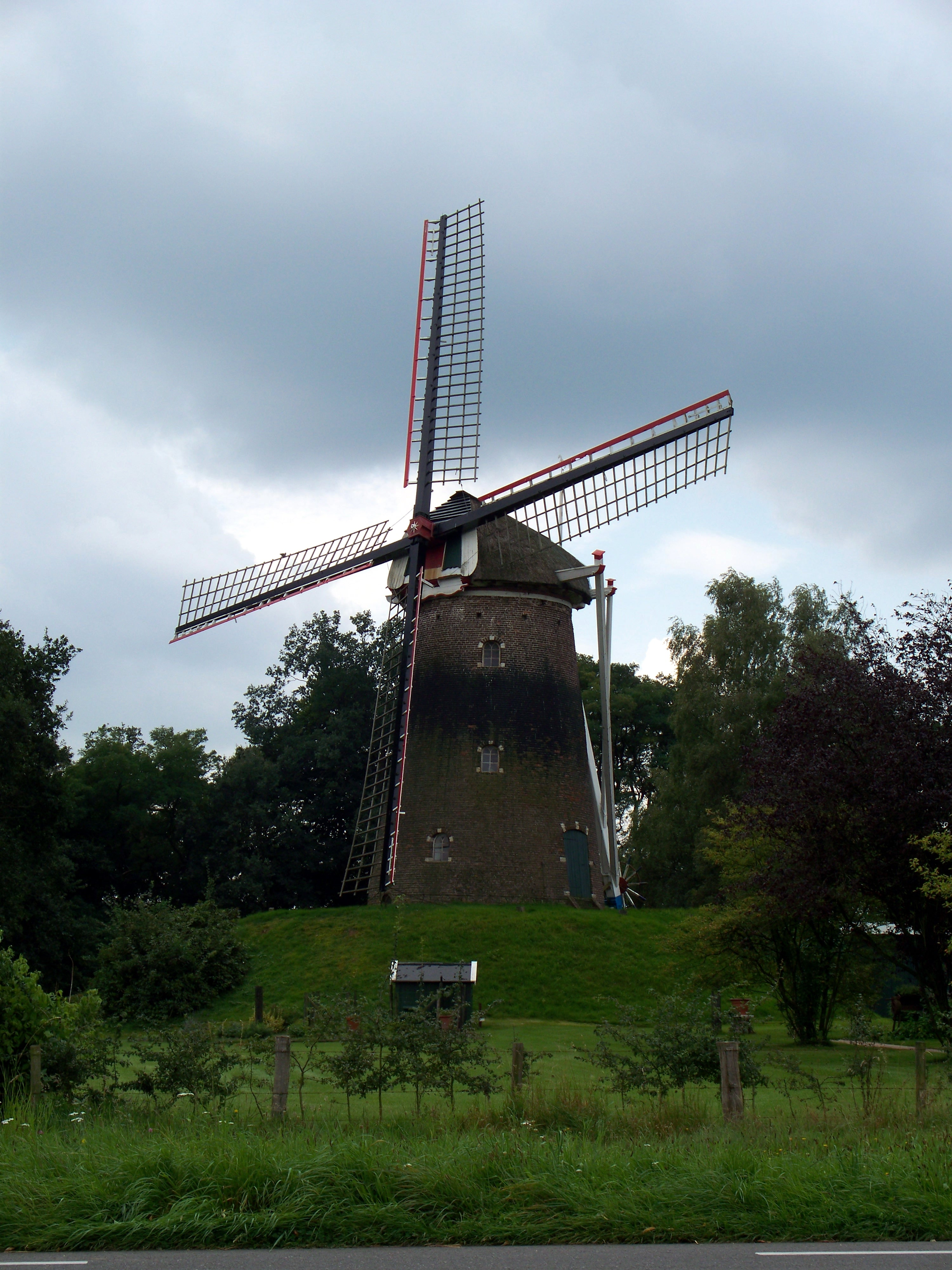 Wittebrinkse molen te Zelhem, Hummeloseweg